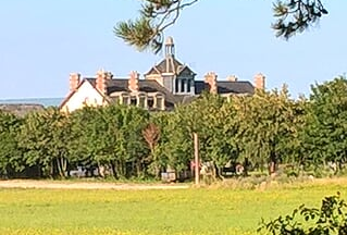 Avoise aujourdhui